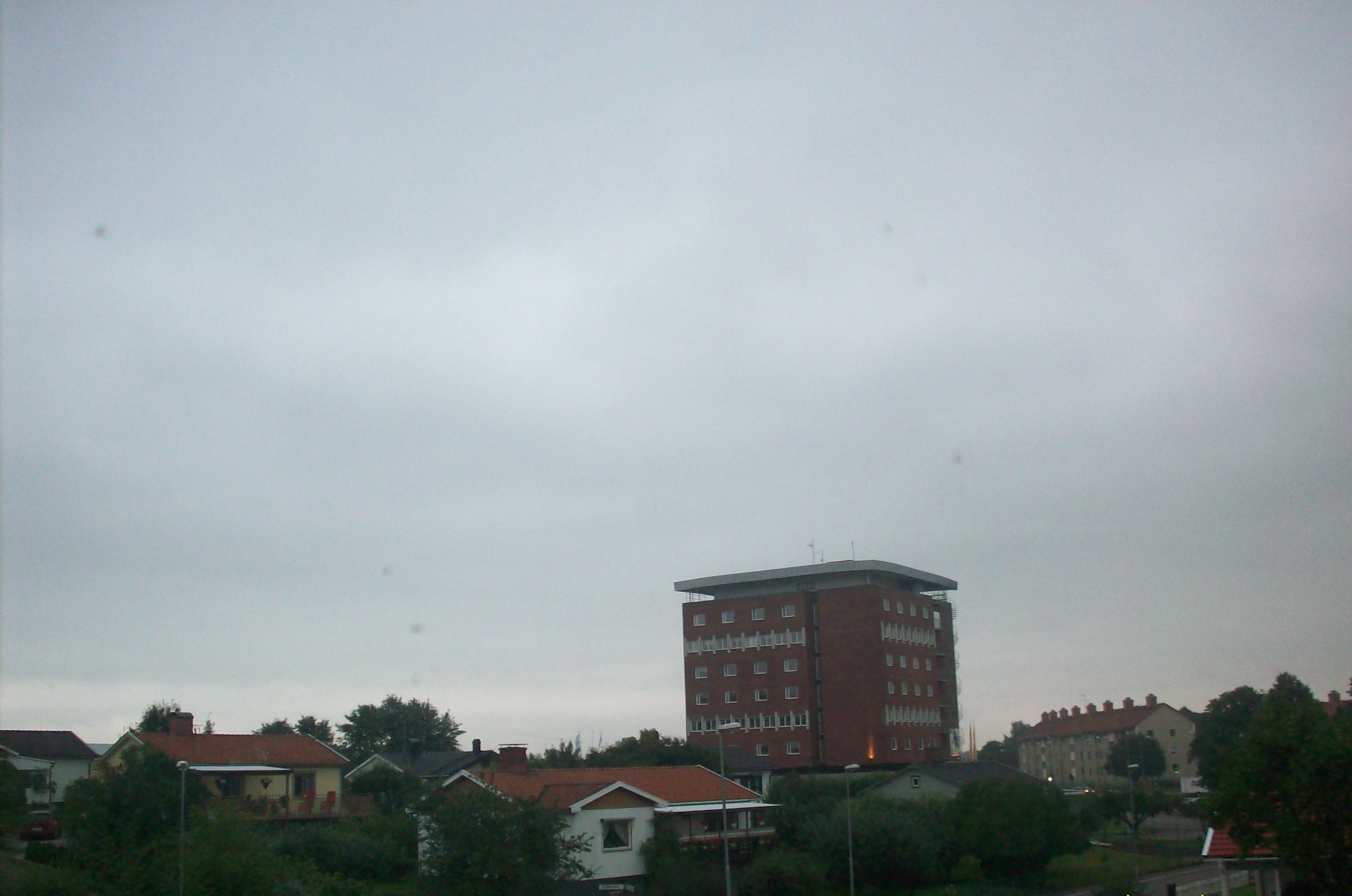 Maiesjö i skövde